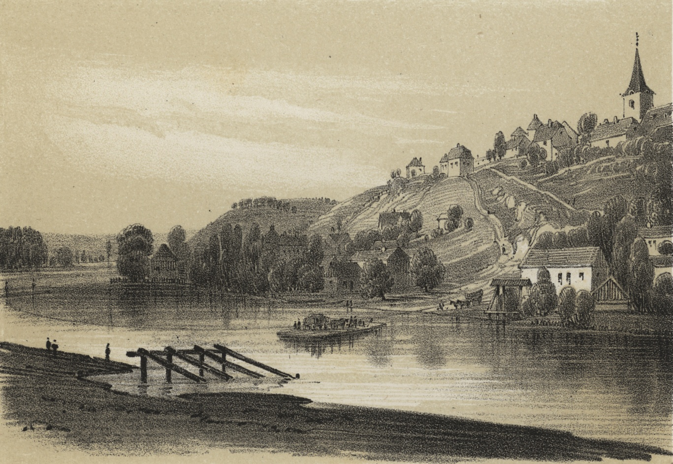 Týnec nad Labem